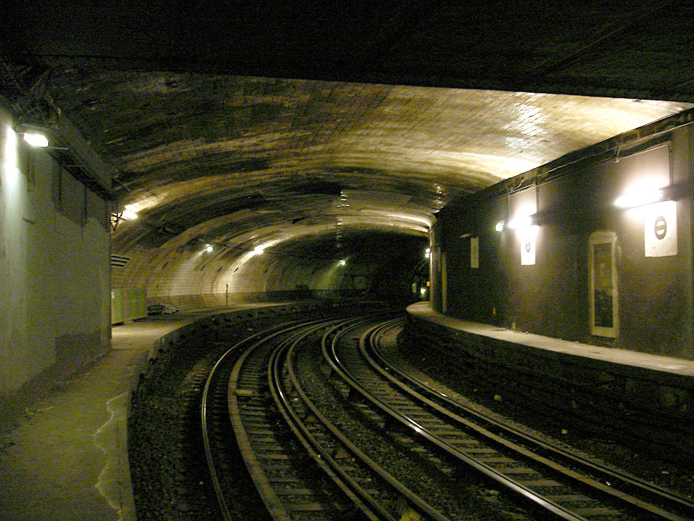 Station Victor Hugo de la ligne 2 du métro de Paris, France. Les quais de l'ancienne station en courbe abandonnée.